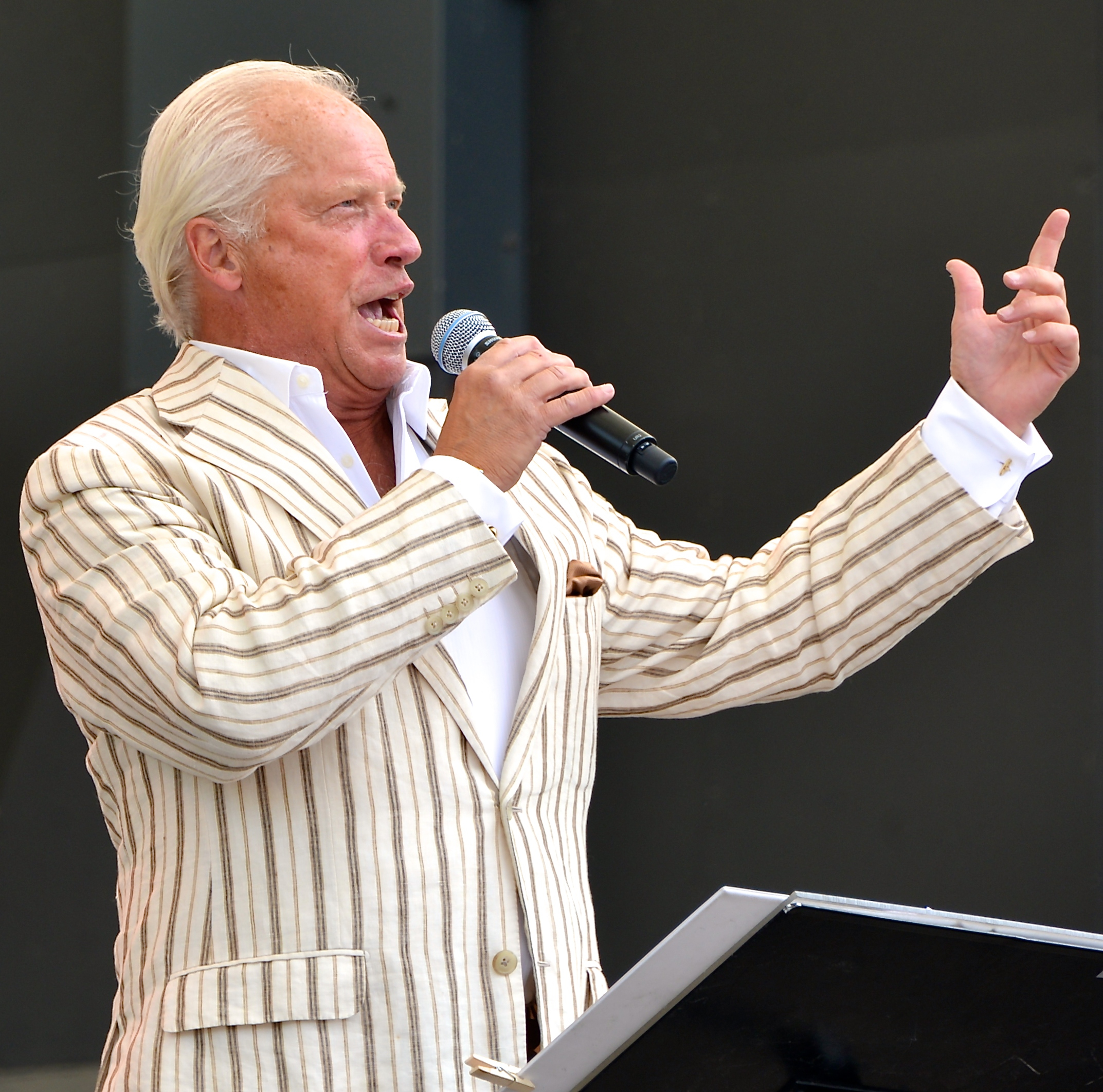 Loa Falkman i Kungsträdgården i Stockholm den 20 juli 2014.